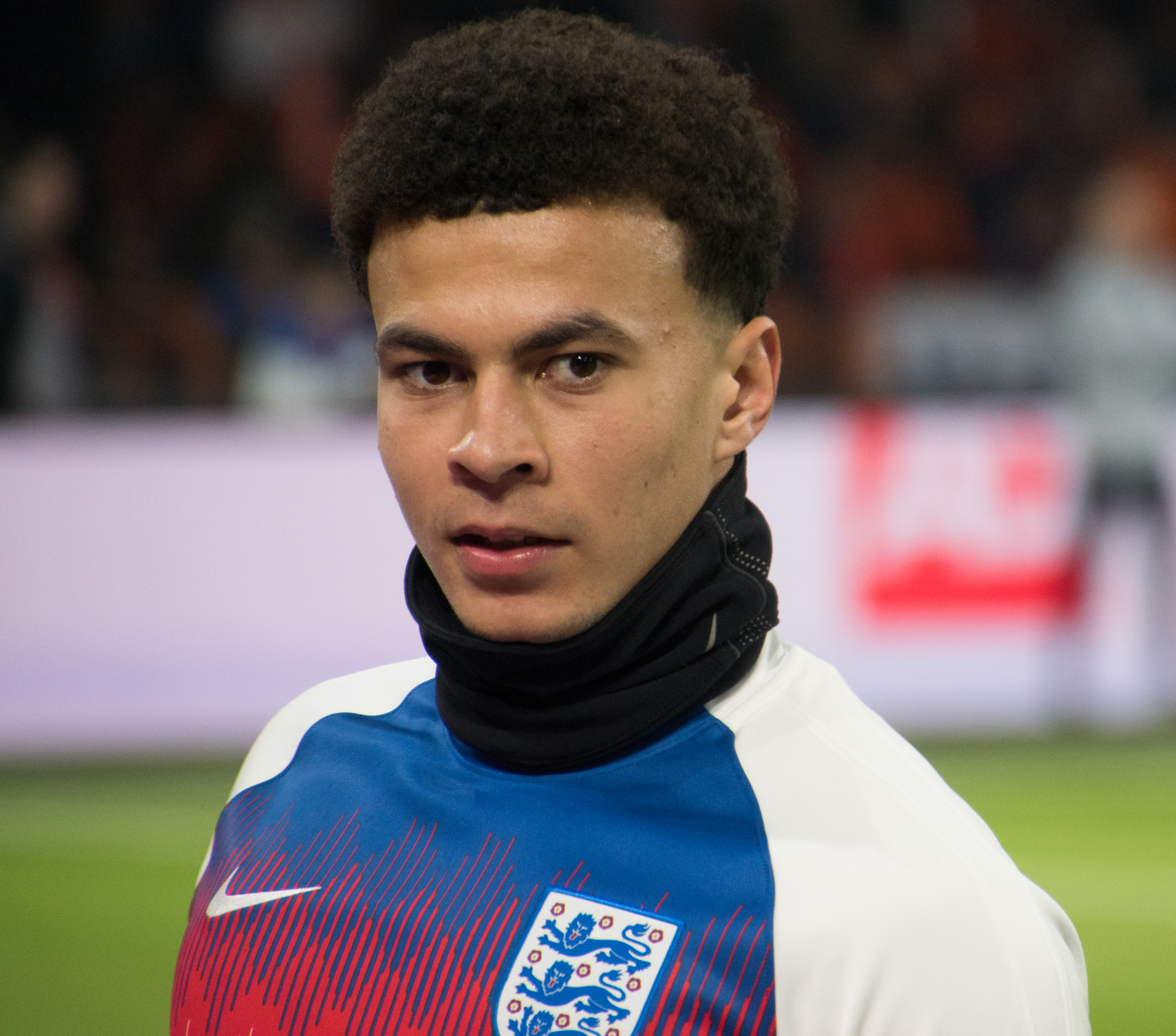 _DSC0086